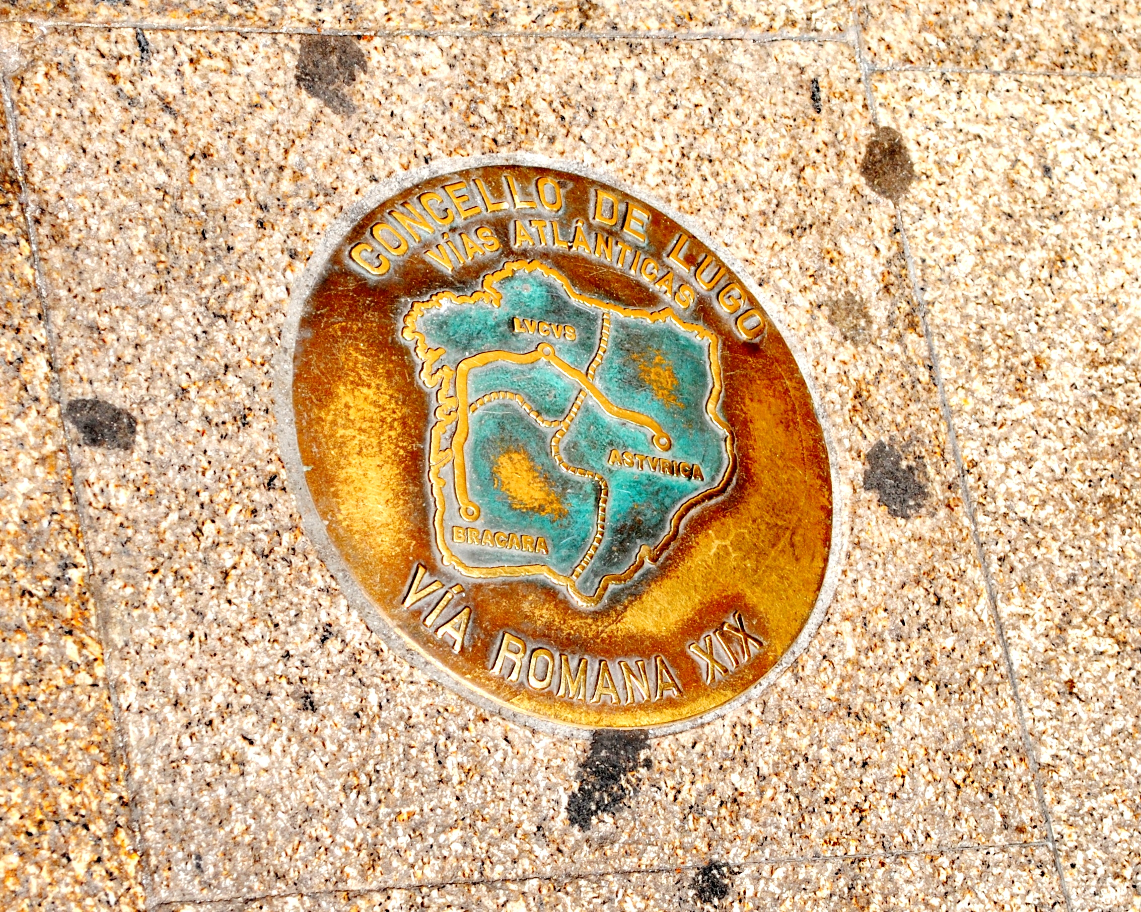 Lugo. Vía romana XIX